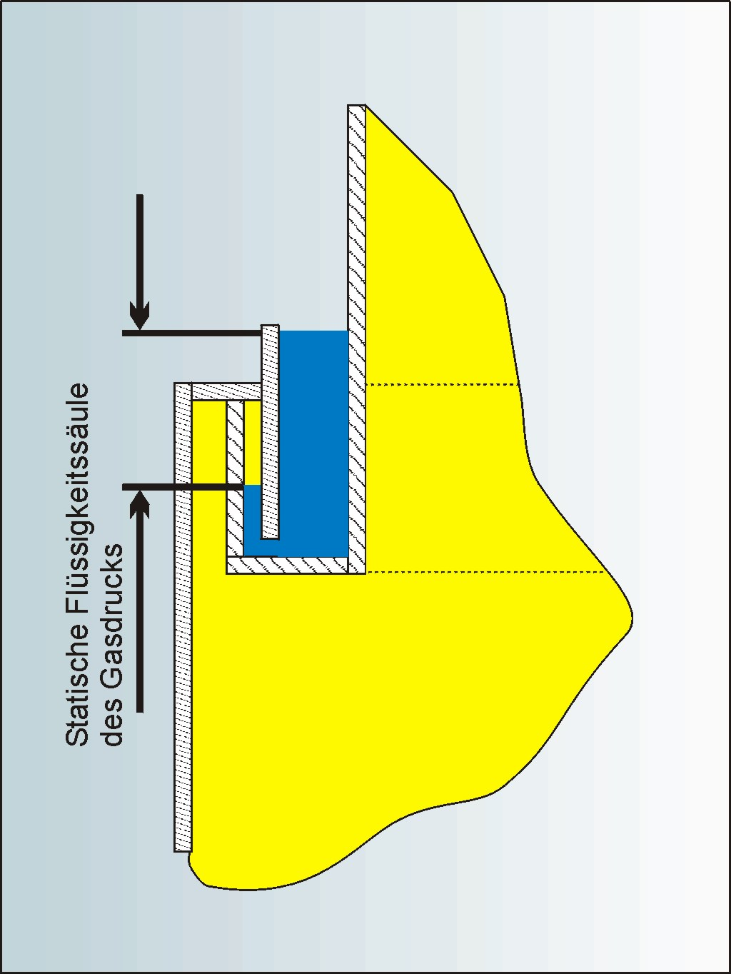 Wassertasse eines Teleskopgasbehälters